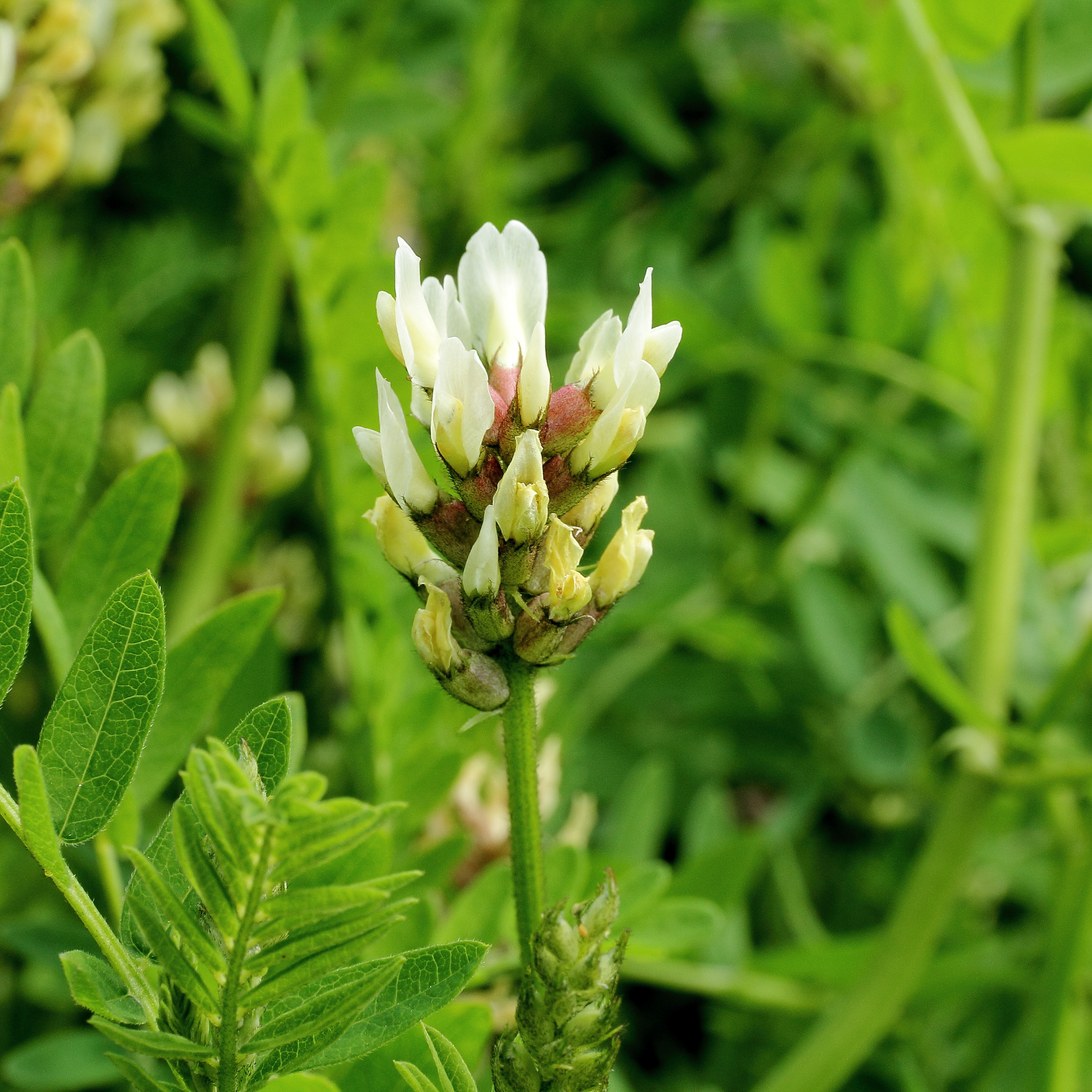 Astragalus cicer i Bergianska trädgården.